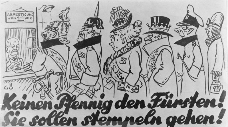 Keinen Pfennig den Fürsten! Sie sollten stempeln gehen! Typische Plakage gegen die Abfindung der Fürsten in Deutschland; 12.3.1926